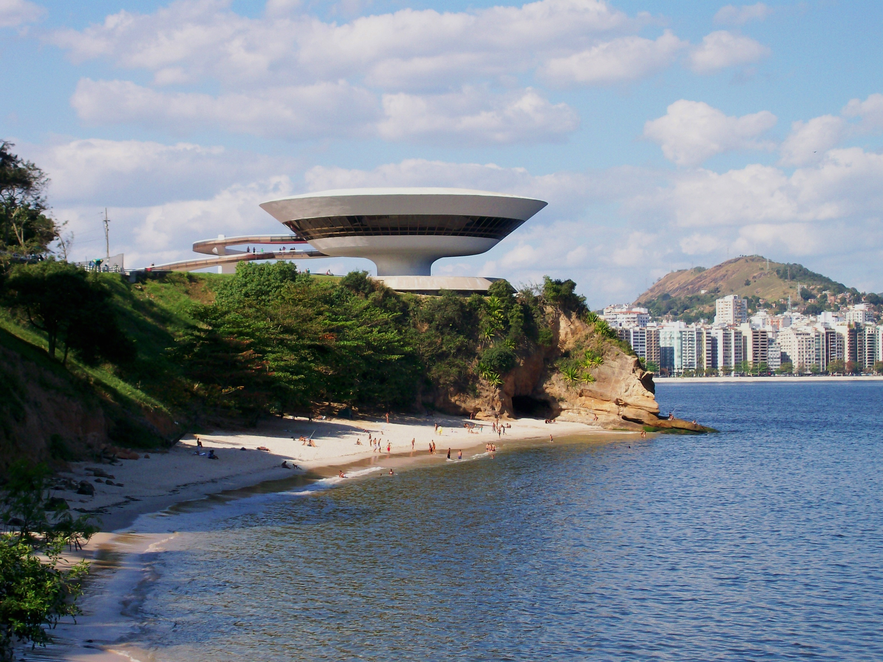 MAC visto da Boa Viagem